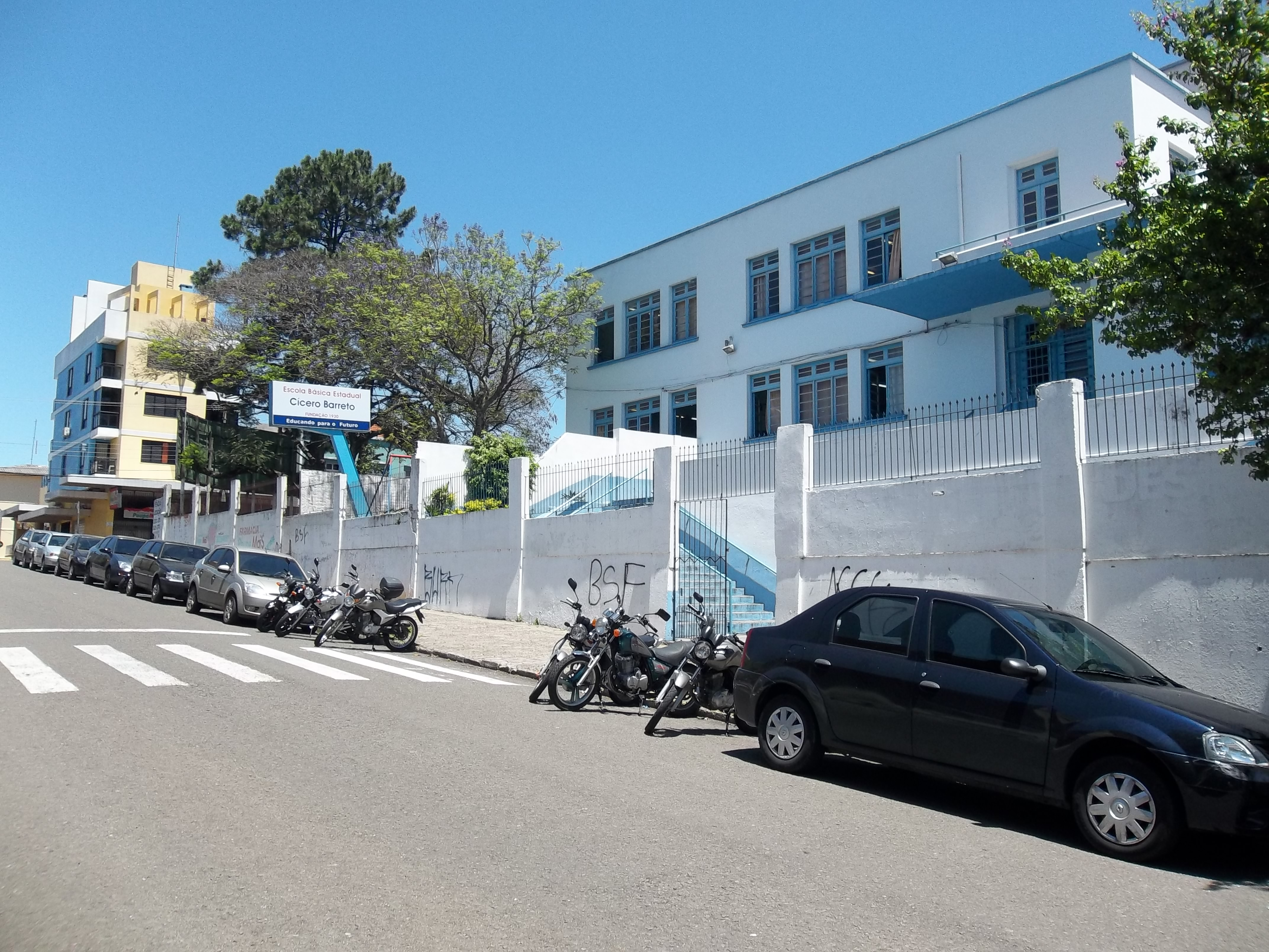 Escola no Bairro Rosário Santa Maria / RS, Brasil